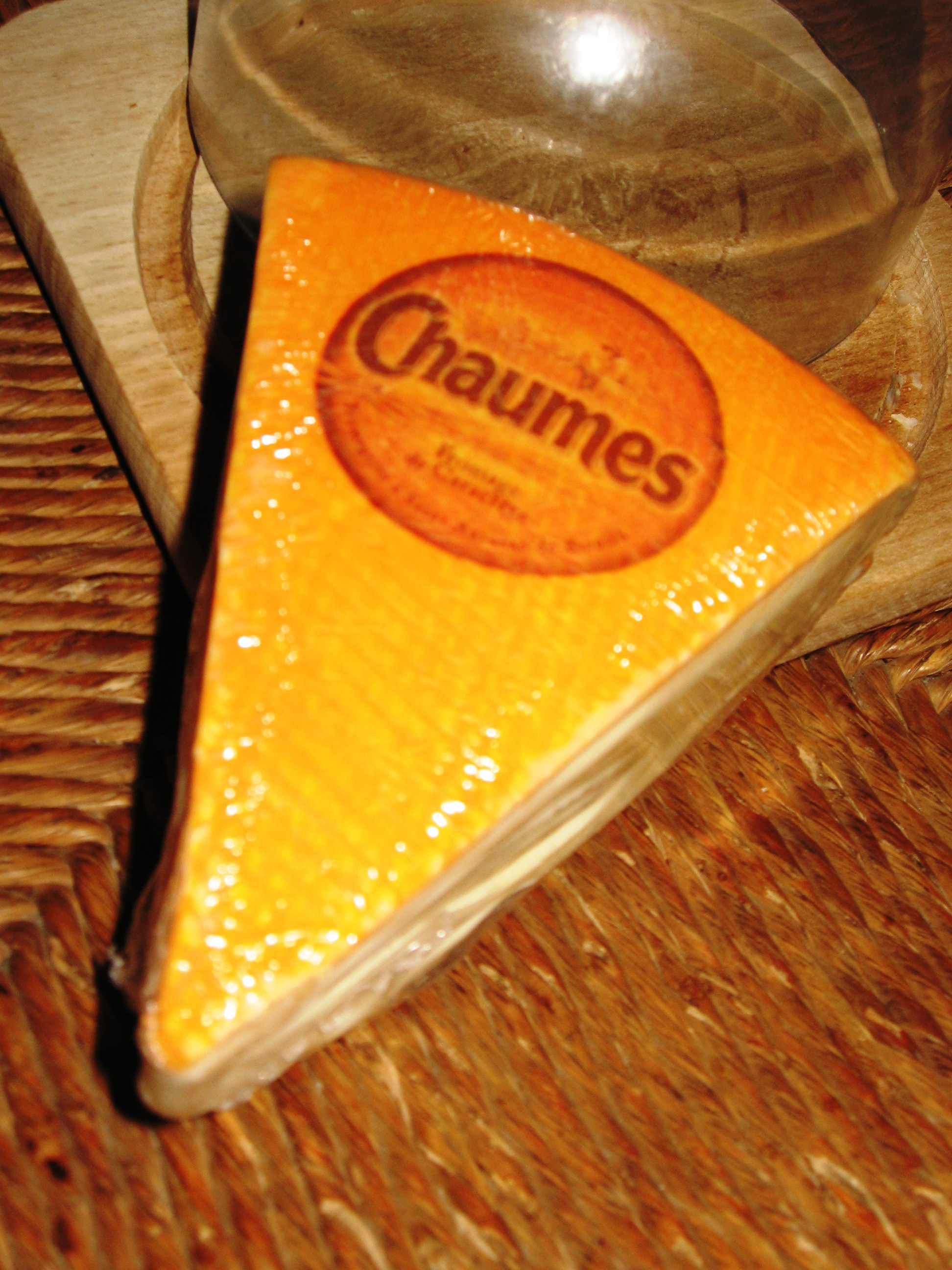 Fromage français à pâte molle dit "Fomage de Caractère" 50% de matière grasse